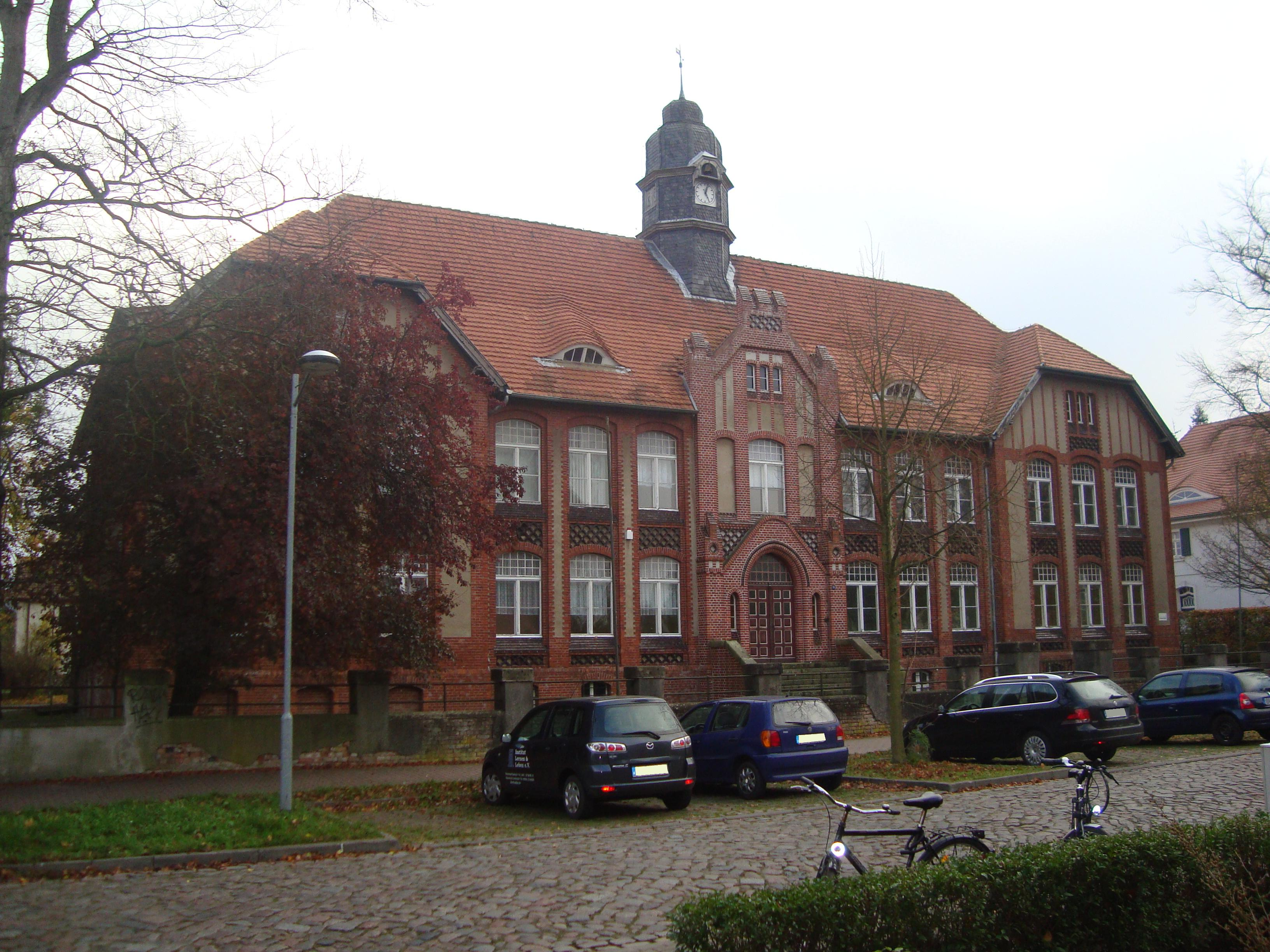 Ehemalige Landwirtschaftsschule in der Hainstraße 13 im Ortsteil Eldena in Greifswald.